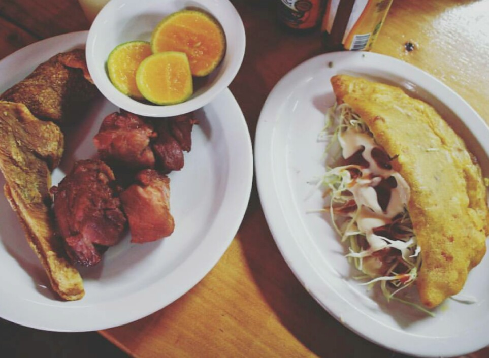 Empanada de carne mechada con papas arreglada, y plato de chicharrones de lomo y panzada en Costa Rica